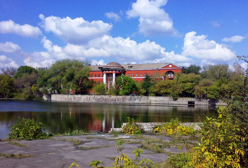 Будівля головного корпусу заводської лікарні, Алчевськ